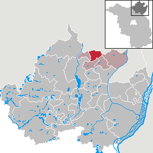 Schönfeld in Brandenburg (Country) - District Uckermark